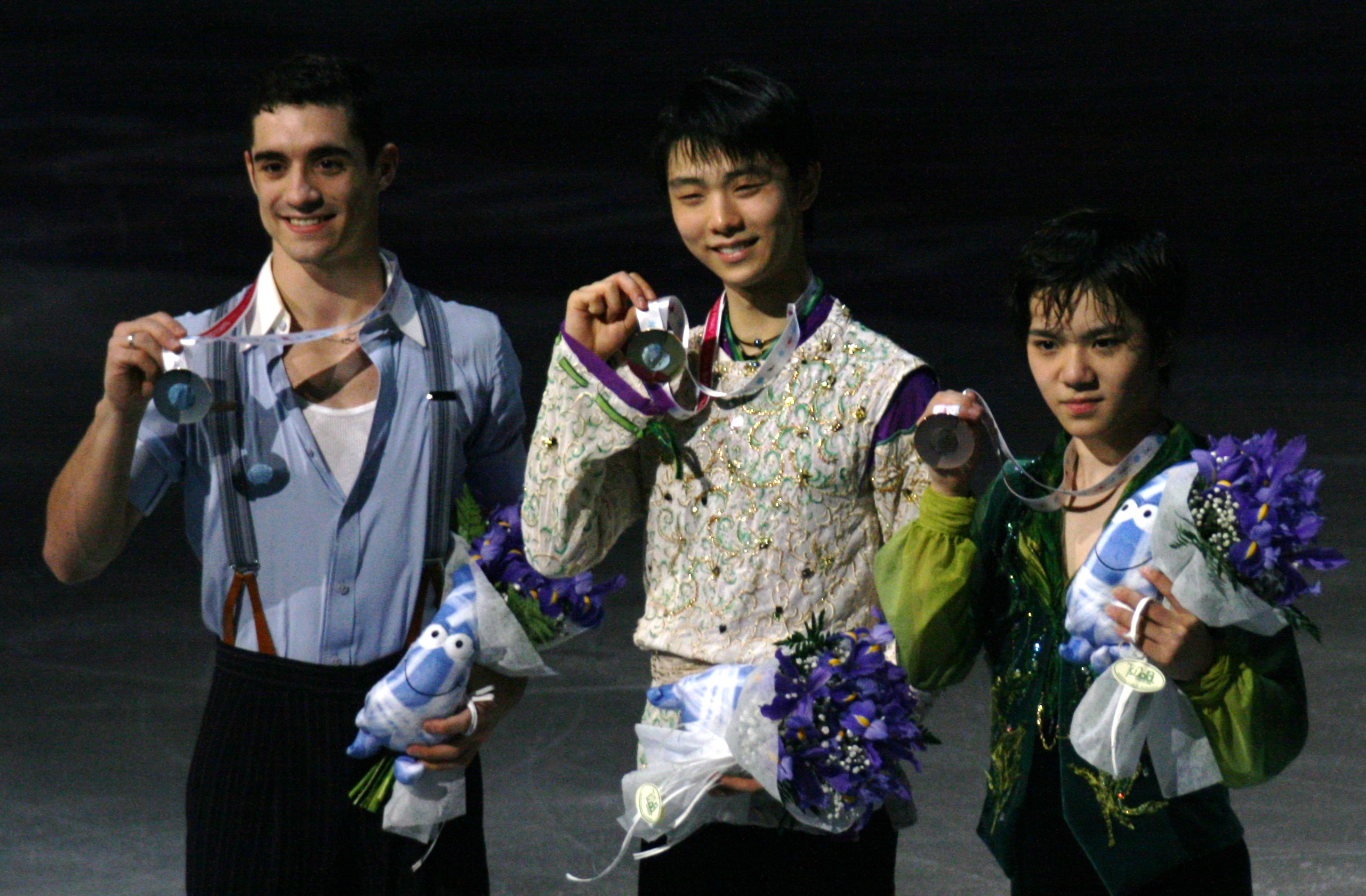 Церемония награждения в мужском одиночном катании на финале Гран-при по фигурному катанию 2015-2016. Слева на право: Хавьер Фернандес (Испания) - 2е место, Юдзуру Ханью (Япония) - 1е место, Шомо Уно (Япония) - 3е место.